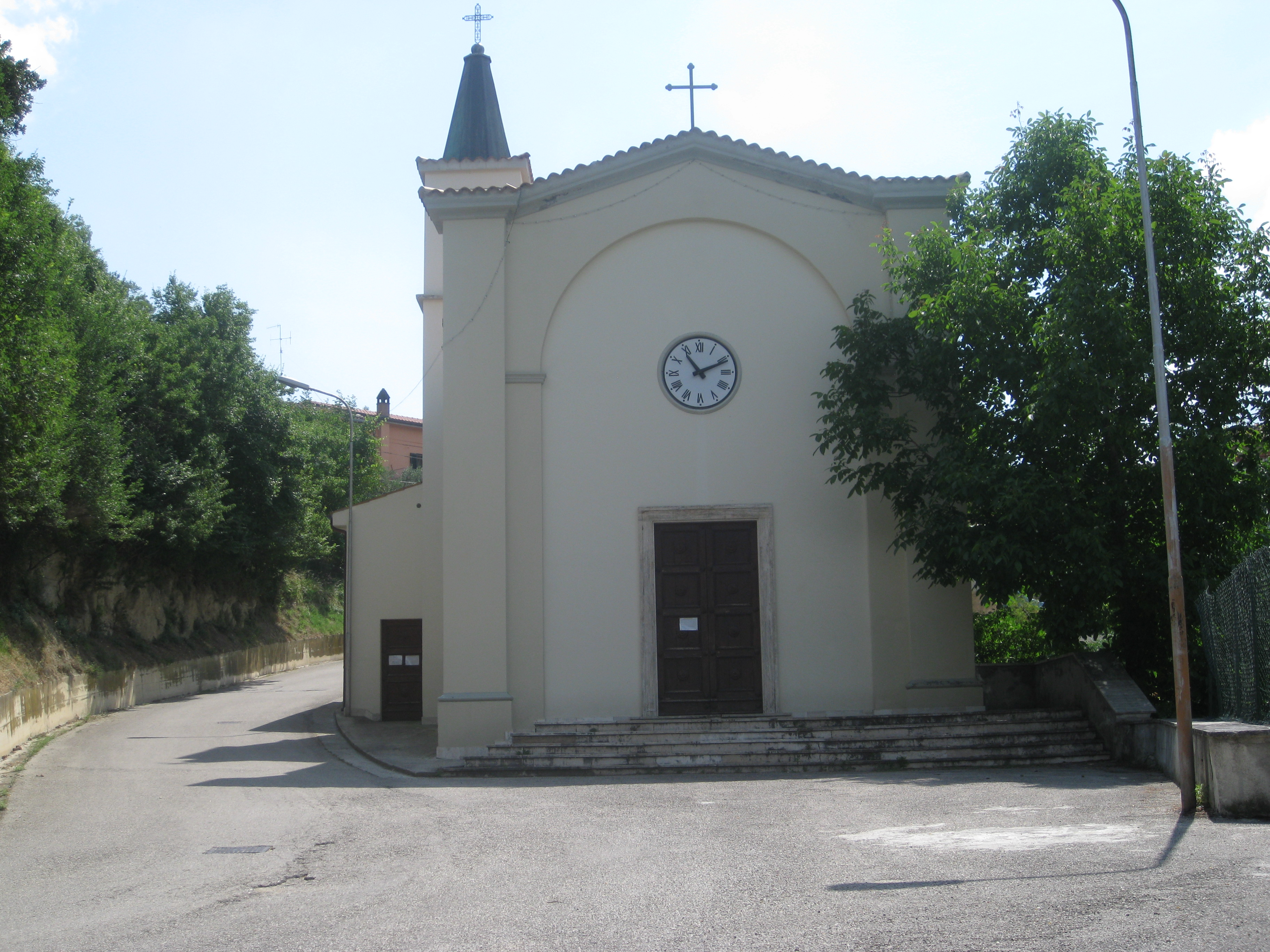 Chiesa di San Nicola di Villa Tofo (foto di Flavio Di Patrizio)